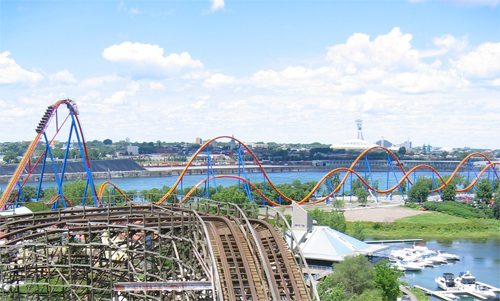 Goliath Laronde